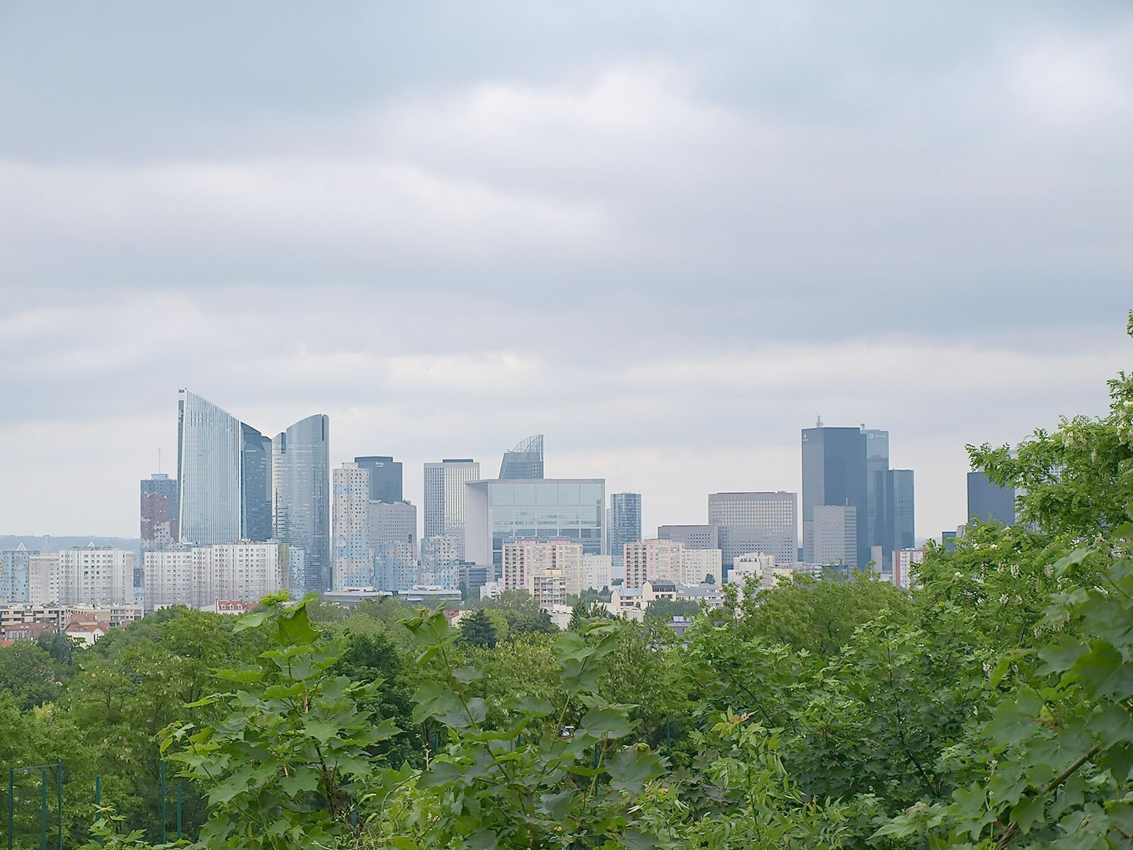 Le quartier de Défense vue depuis le mont Valérien, près de Paris, France.